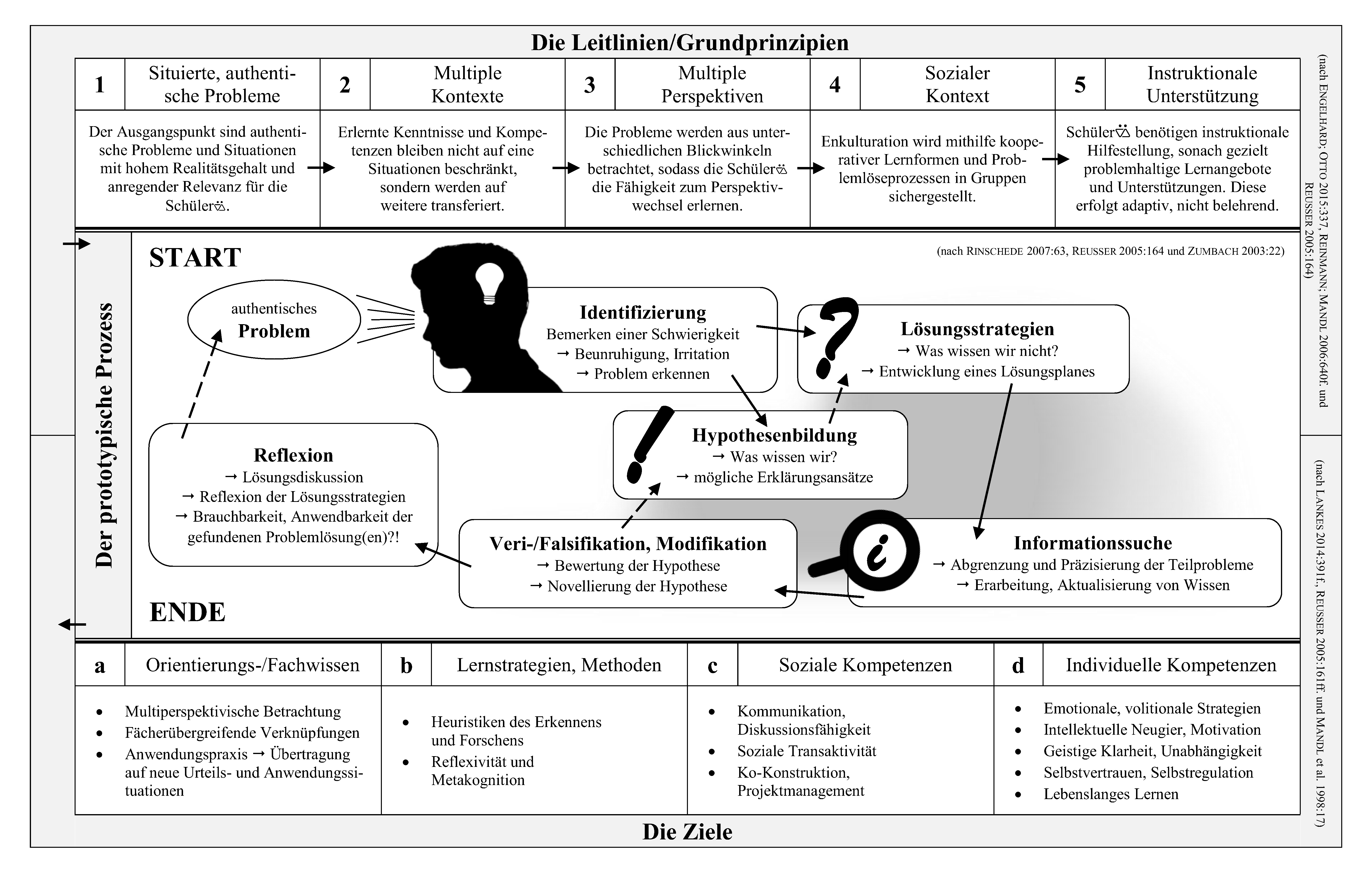 Literaturquellen: ENGELHARD, KARL; OTTO, KARL-HEINZ (2015): Rahmenbedingungen, Bedeutung, Möglichkeiten und Grenzen kompetenzorientierten Geographieunterrichts. In: REINFRIED, SIBYLLE; HAUBRICH, HARTWIG (Hrsg.): Geographie unterrichten lernen. Die Didaktik der Geographie. Berlin: Cornelsen, S. 310-323. LANKES, EVA-MARIA (2014): Problemorientiertes Lernen. In: EINSIEDLER, WOLFGANG; GÖTZ, MARGARETE; HARTINGER, ANDREAS; HEINZEL, FRIEDERIKE; KAHLERT, JOACHIM; SANDFUCHS, UWE (Hrsg.): Handbuch Grundschulpädagogik und Grundschuldidaktik. Bad Heilbrunn: Klinkhardt, S. 389-393. MANDL, HEINZ; REINMANN-ROTHMEIER, GABI; GRÄSEL, CORNELIA (1998): Gutachten zur Vorbereitung des Programms »Systematische Einbeziehung von Medien, Informations- und Kommunikationstechnologien in Lehr- und Lernprozesse«. Bonn: BLK. (letzter Zugriff: 18.05.2016). REINMANN, GABI; MANDL, HEINZ (2006): Unterrichten und Lernumgebungen gestalten. In: KRAPP, ANDREAS; WEIDENMANN, BERND (Hrsg.): Pädagogische Psychologie. Ein Lehrbuch. Weinheim u.a.: Beltz, S. 613-658. REUSSER, KURT (2005): Problemorientiertes Lernen – Tiefenstruktur, Gestaltungsformen, Wirkung. In: Beiträge zur Lehrerbildung. Jg. 23. Nr. 2, S. 159-182. RINSCHEDE, GISBERT (2007): Geographiedidaktik. Paderborn: Schöningh. ZUMBACH, JÖRG (2003): PBL. Problembasiertes Lernen. Münster u.a.: Waxmann.